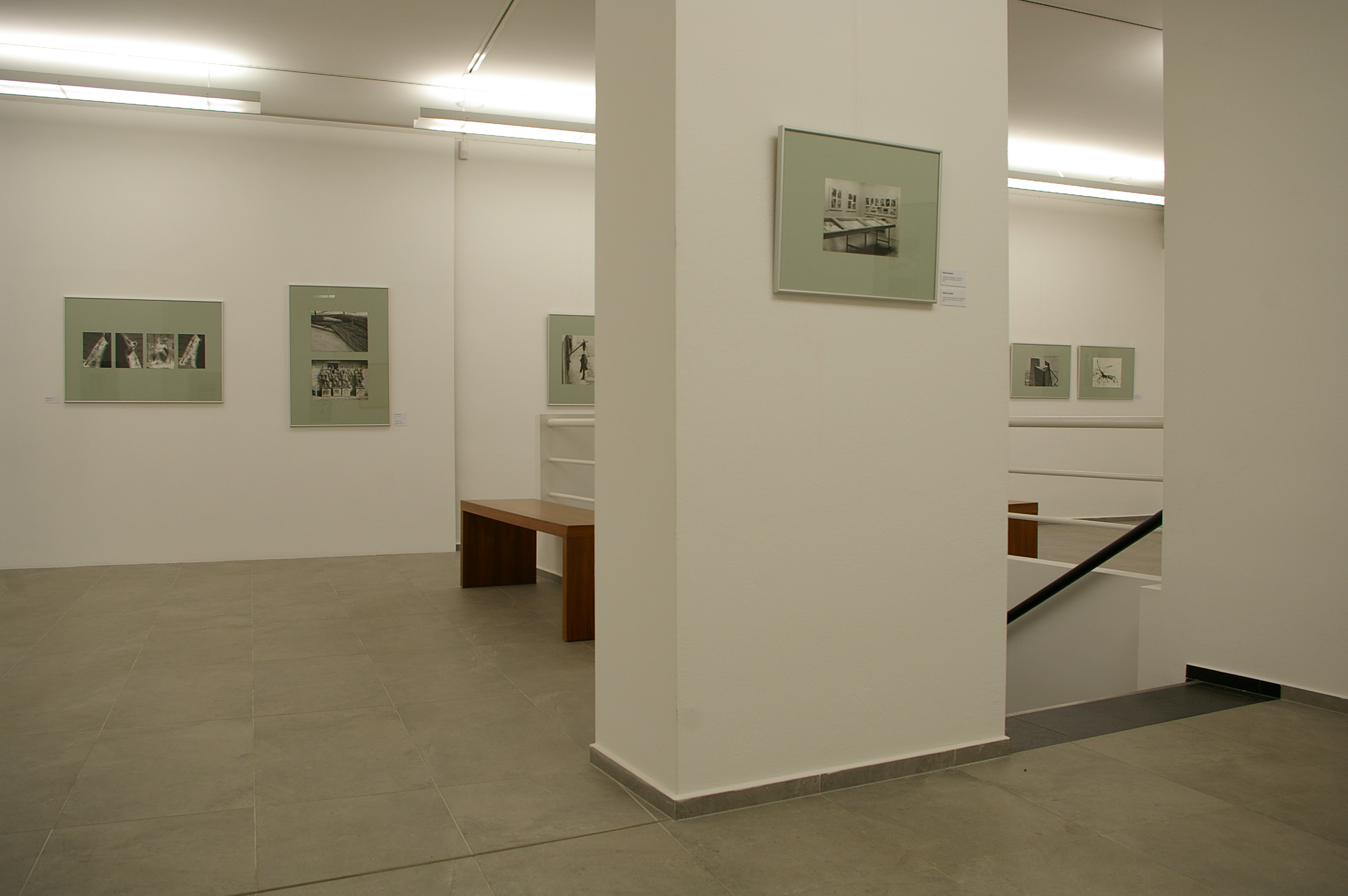 Mesiac fotografie Bratislava 2013 Výstava